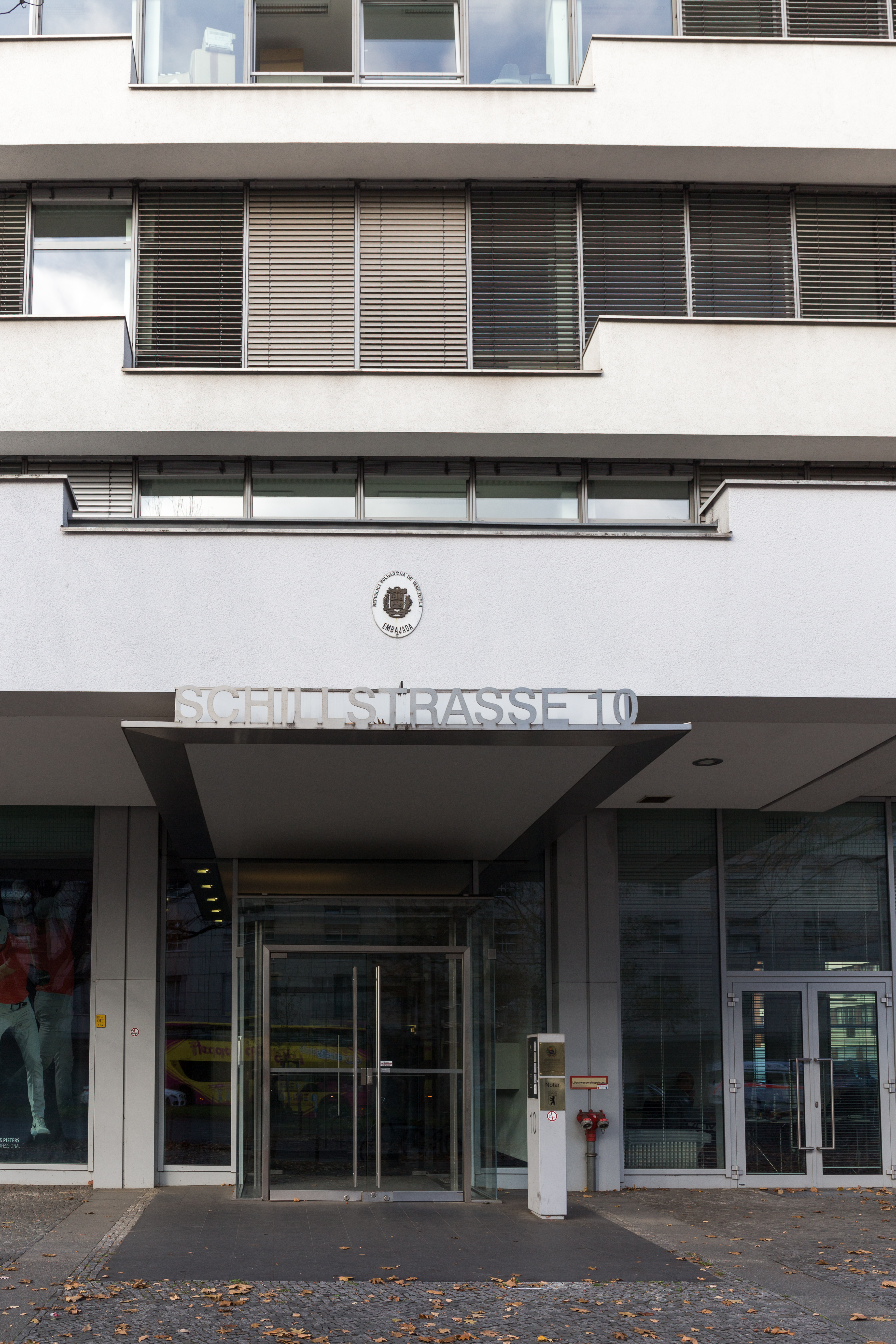 Ambassade du Venezuela à Berlin, Schillstraße 10.